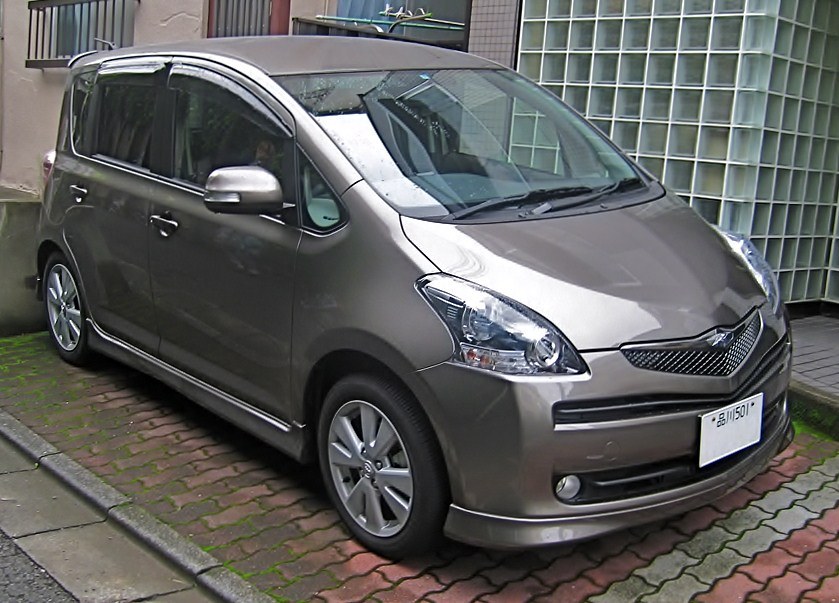 Photo destinée à l'article sur la Toyota Ractis